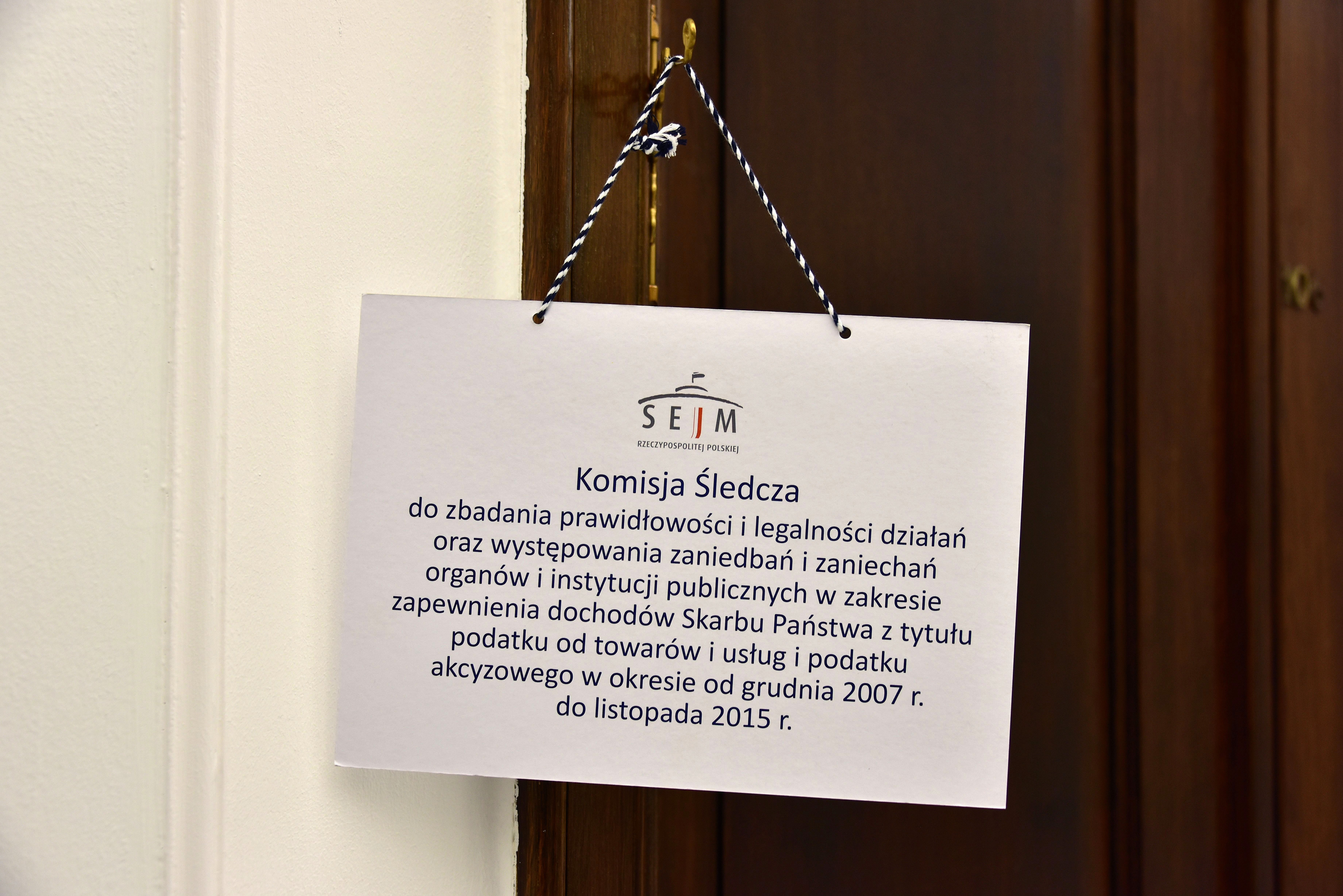 Wywieszka o trwającym posiedzeniu komisji śledczej do zbadania prawidłowości i legalności działań oraz występowania zaniedbań i zaniechań organów i instytucji publicznych w zakresie zapewnienia dochodów Skarbu Państwa z tytułu podatku od towarów i usług i podatku akcyzowego